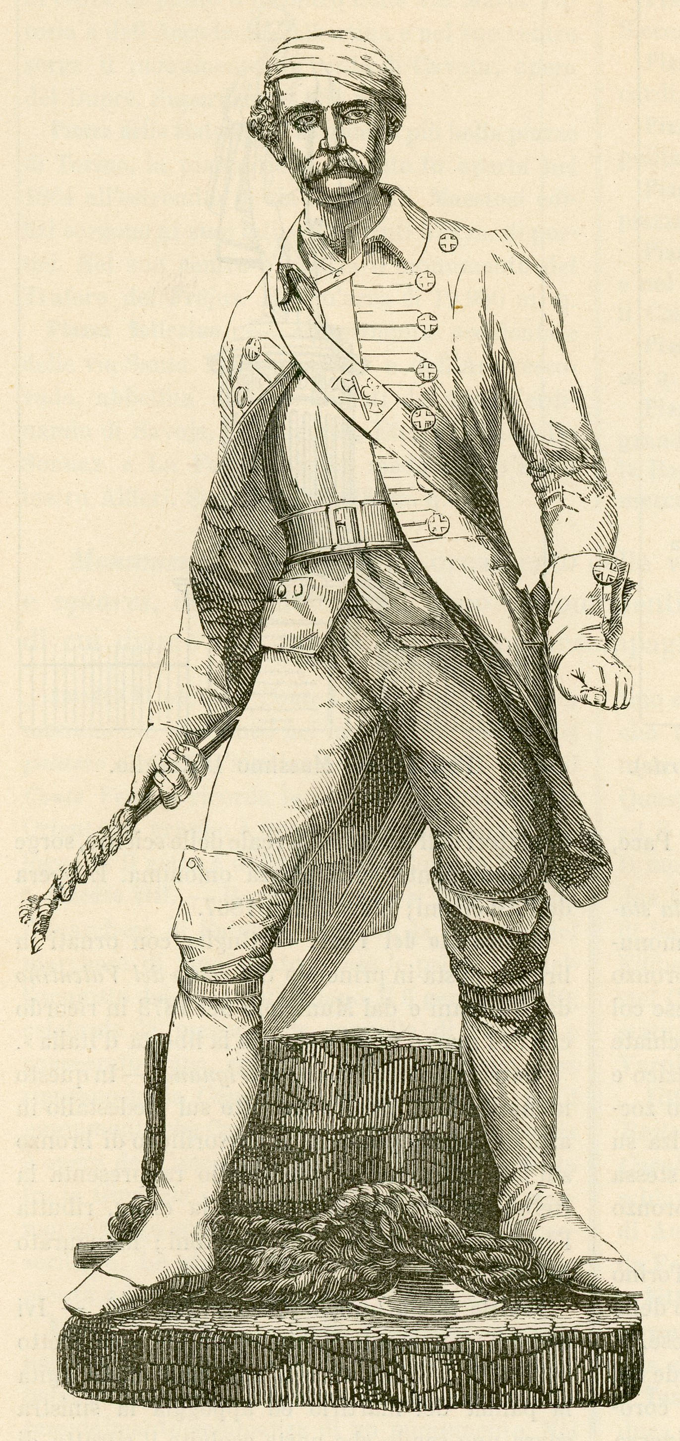 Pietro Micca (incisione).